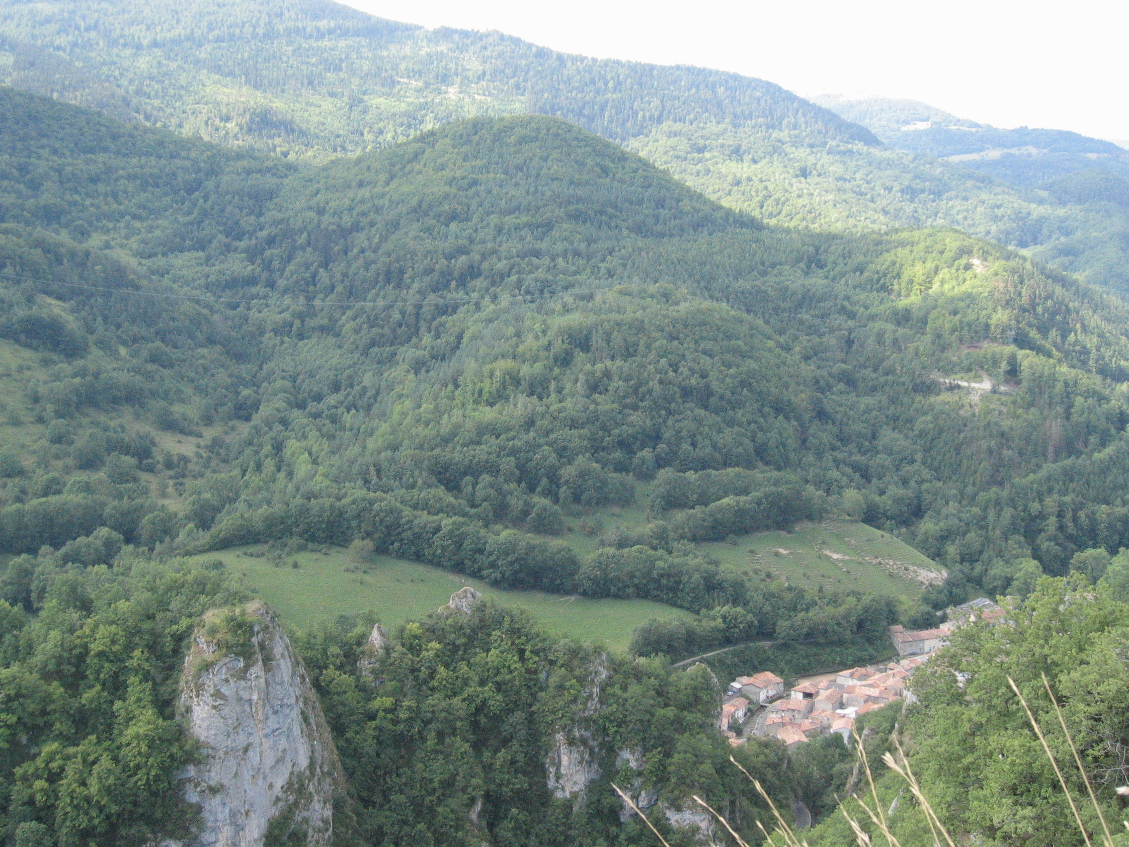 Vue du piton rocheux où se situait l'ancienne forteresse de Niort-de-Sault.